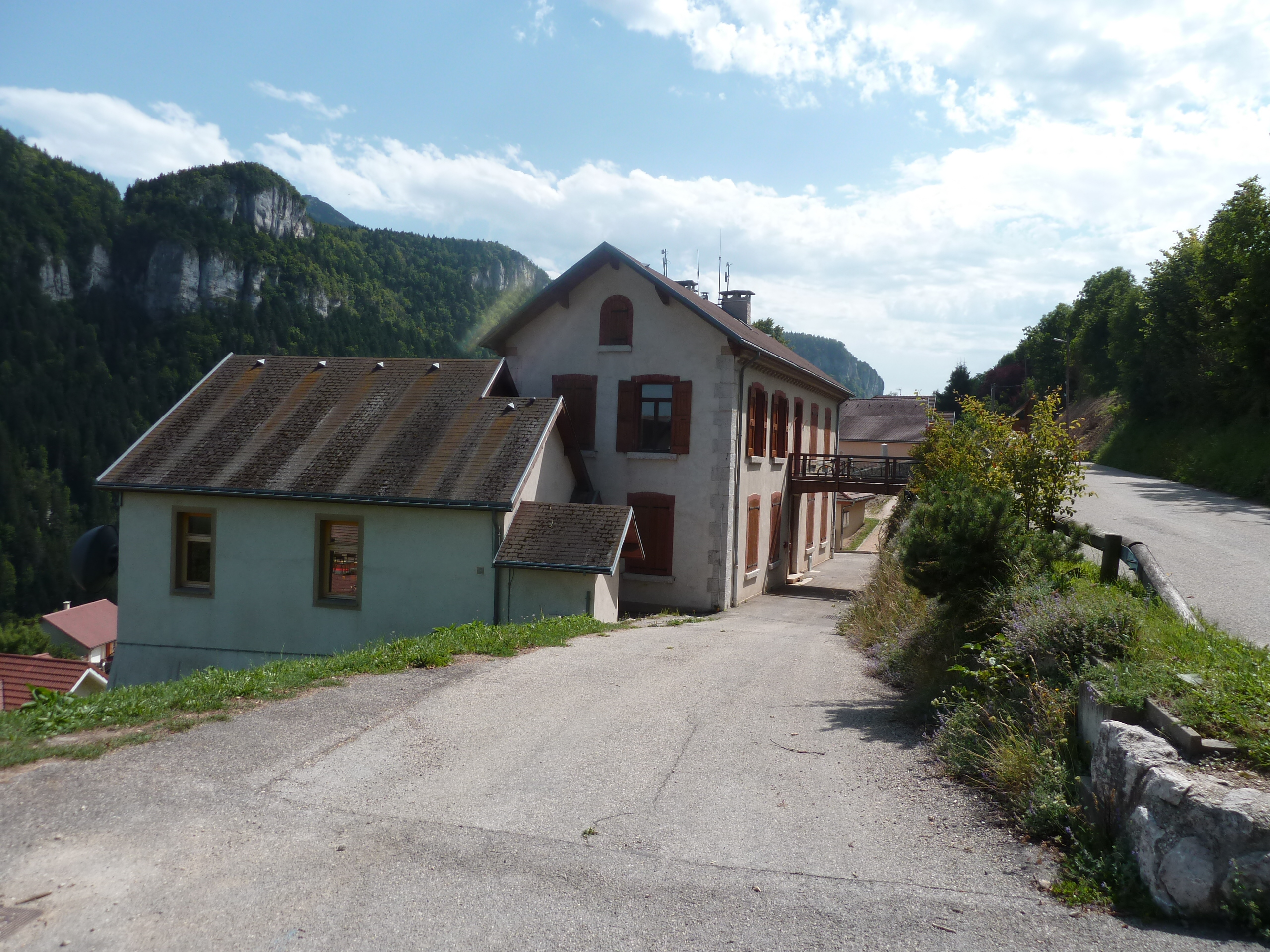 Engins (38) : La mairie.